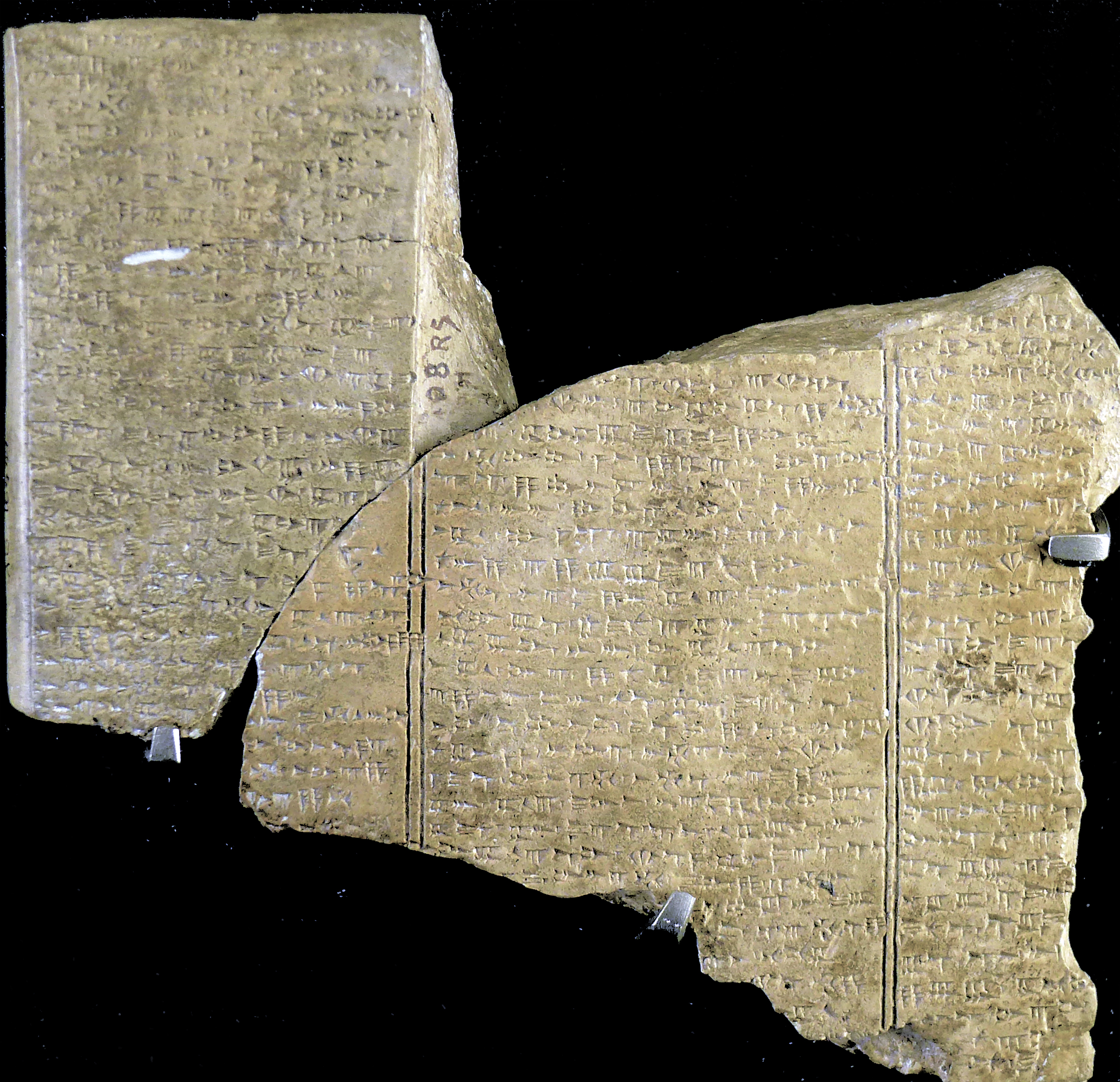 Tablette : poème mythologique – cycle de Ba’al et Ba’al et la Mort